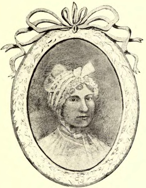 Vol. 3